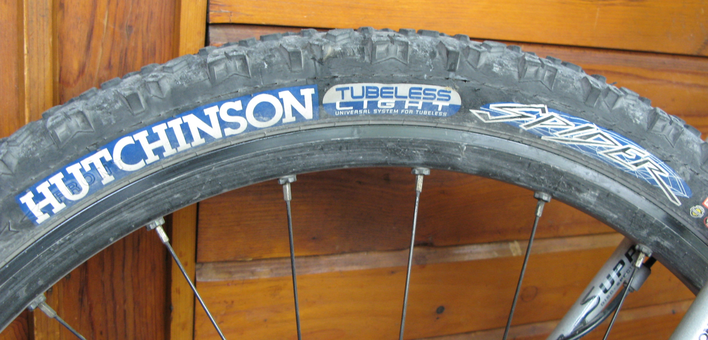 Хатчинсон Спајдер. Пример тублес гуме.